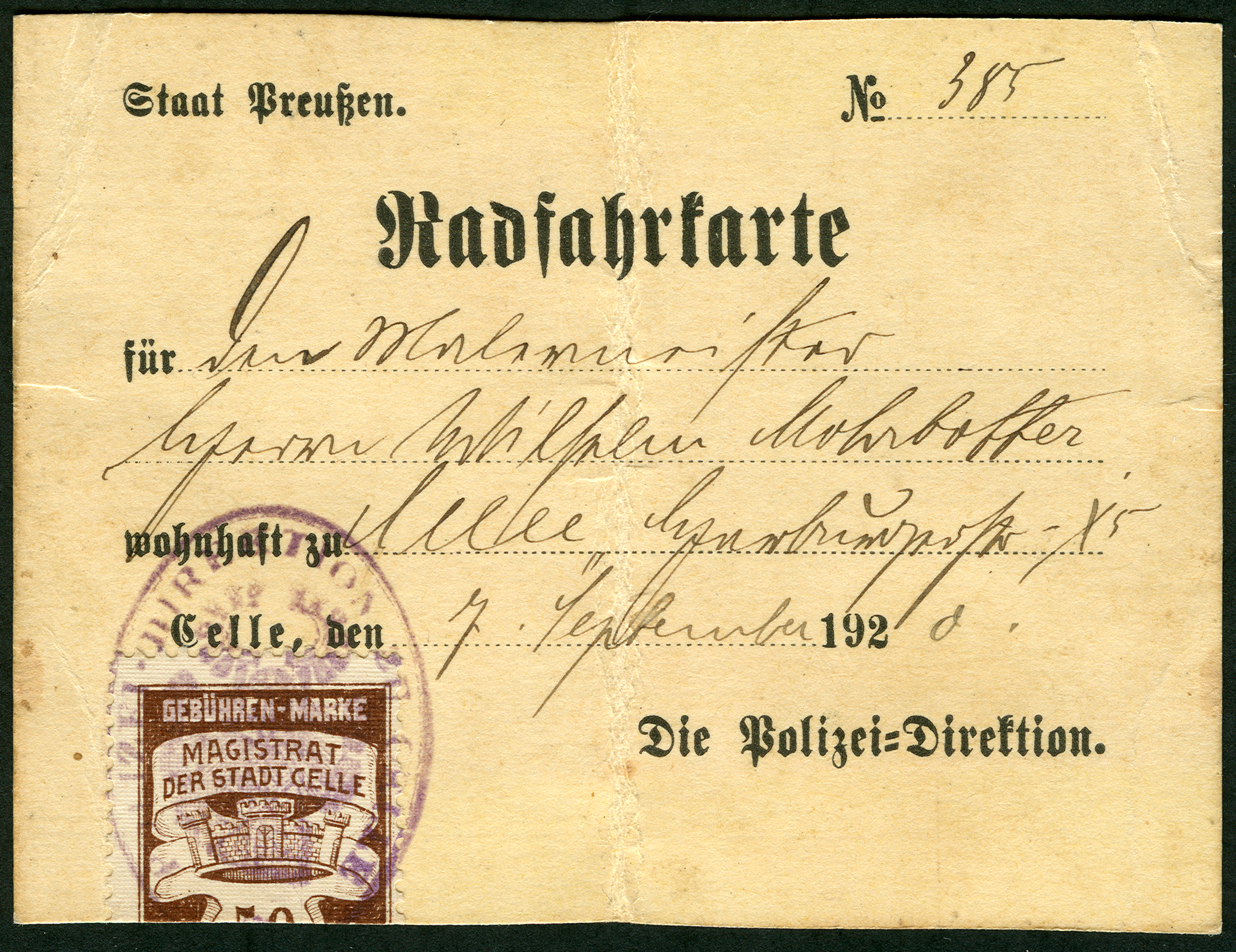 Radfahrkarte "Staat Preußen No. 385" mit Vordruck für die 1920er Jahre für "Die Polizei-Direktion in Celle, ausgestellt am 7. September 1920 für „den Malermeister Herrn Wilhelm Mohrbotter, wohnhaft zu Celle, Harburgerstr. 15,“ mit vom Magistrat] der Stadt Celle gestempelter und etwa halbierter Gebührenmarke zu 50 Pfennig. Der Karton mit den Maßen 10cm x ca. 7,4cm wurde oben und unten offenbar mit der Schere per Hand durchgeschnitten und - wohl von seinem Besitzer - in der Mitte geknickt. Die Rückseite ist blanco mit Resten aufgeklebten Papiers ...